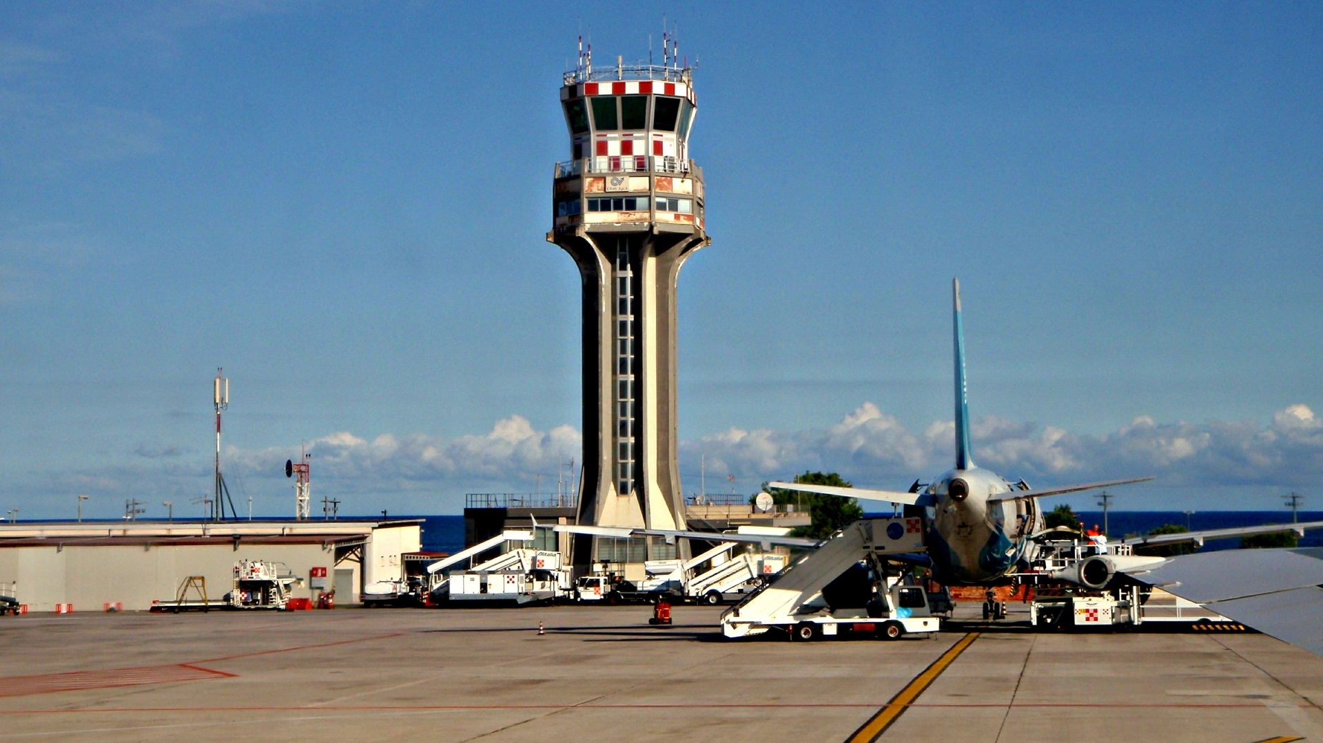 Punta Raisi lennuvälja lennujuhtimistorn